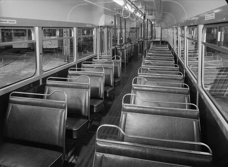 Interiøret i Høka motorvogn nr. 204-233, med seter fra Romo fabrikker. 1952.